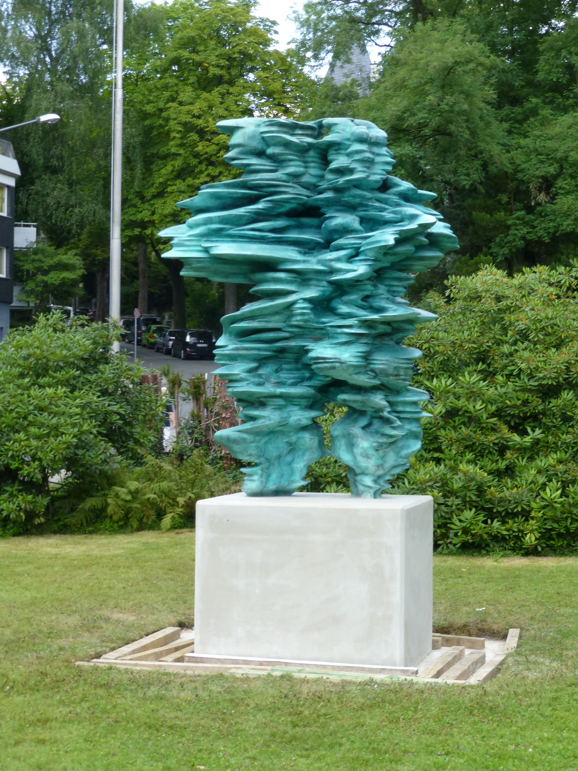 Hubertusallee, Wuppertal